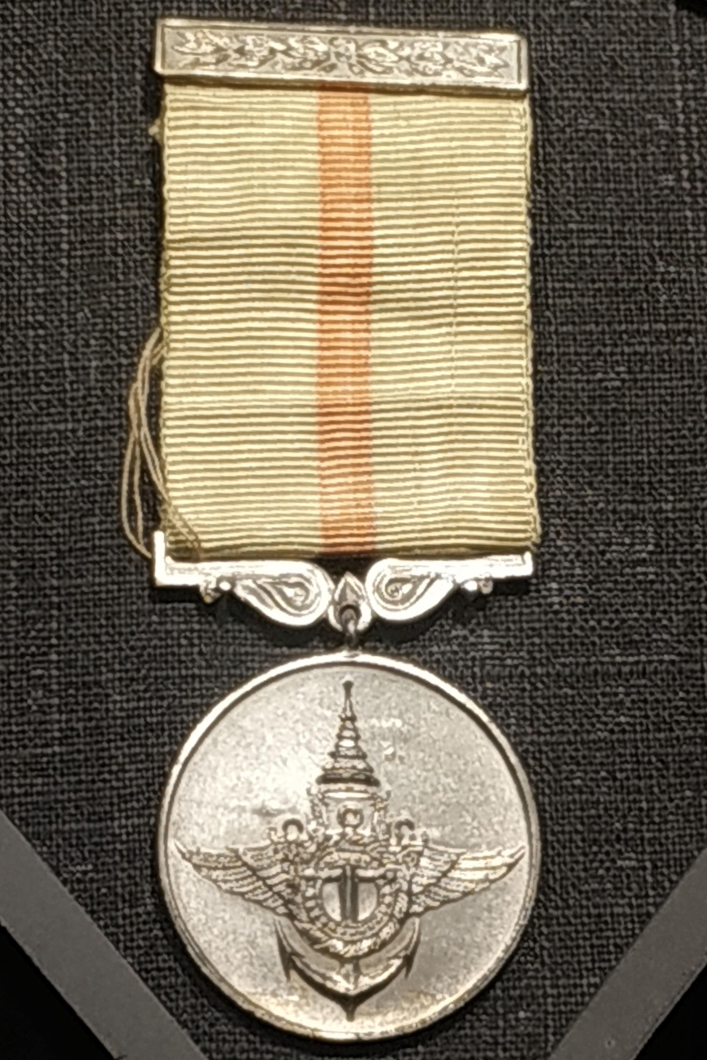 เหรียญช่วยราชการเขตภายใน กรณีสงครามมหาเอเชียบูรพา สำหรับบุรุษ บันทึกภาพจากพิพิธภัณฑ์เหรียญกษาปณานุรักษ์ ถนนจักรพงษ์ เขตพระนคร กรุงเทพมหานคร ประเทศไทย เมื่อวันที่ 29 กุมภาพันธ์ พ.ศ. 2563